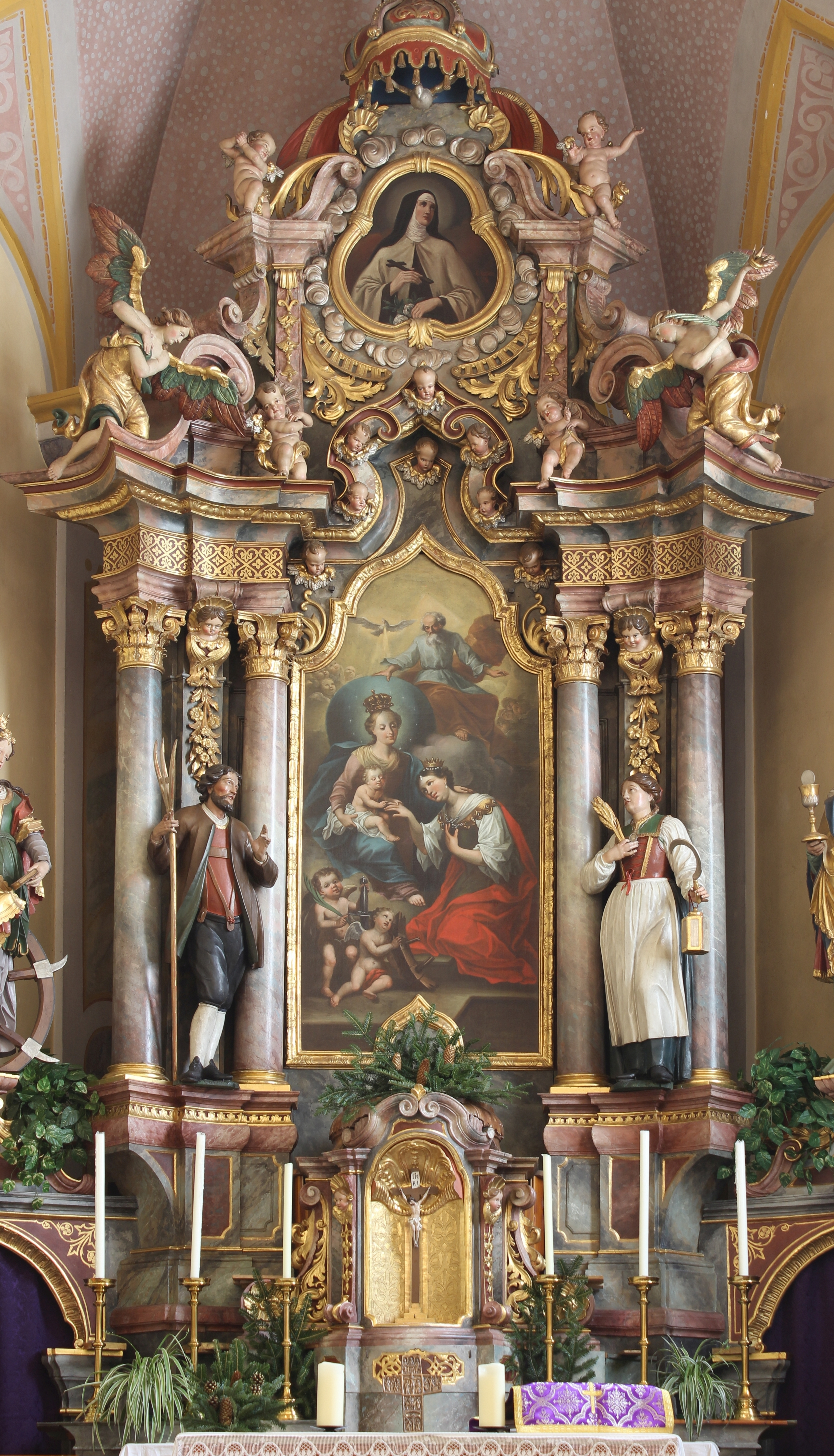 Hauptaltar der Pfarrkirche St. Katharina in Katharinaberg, Schnals, Südtirol